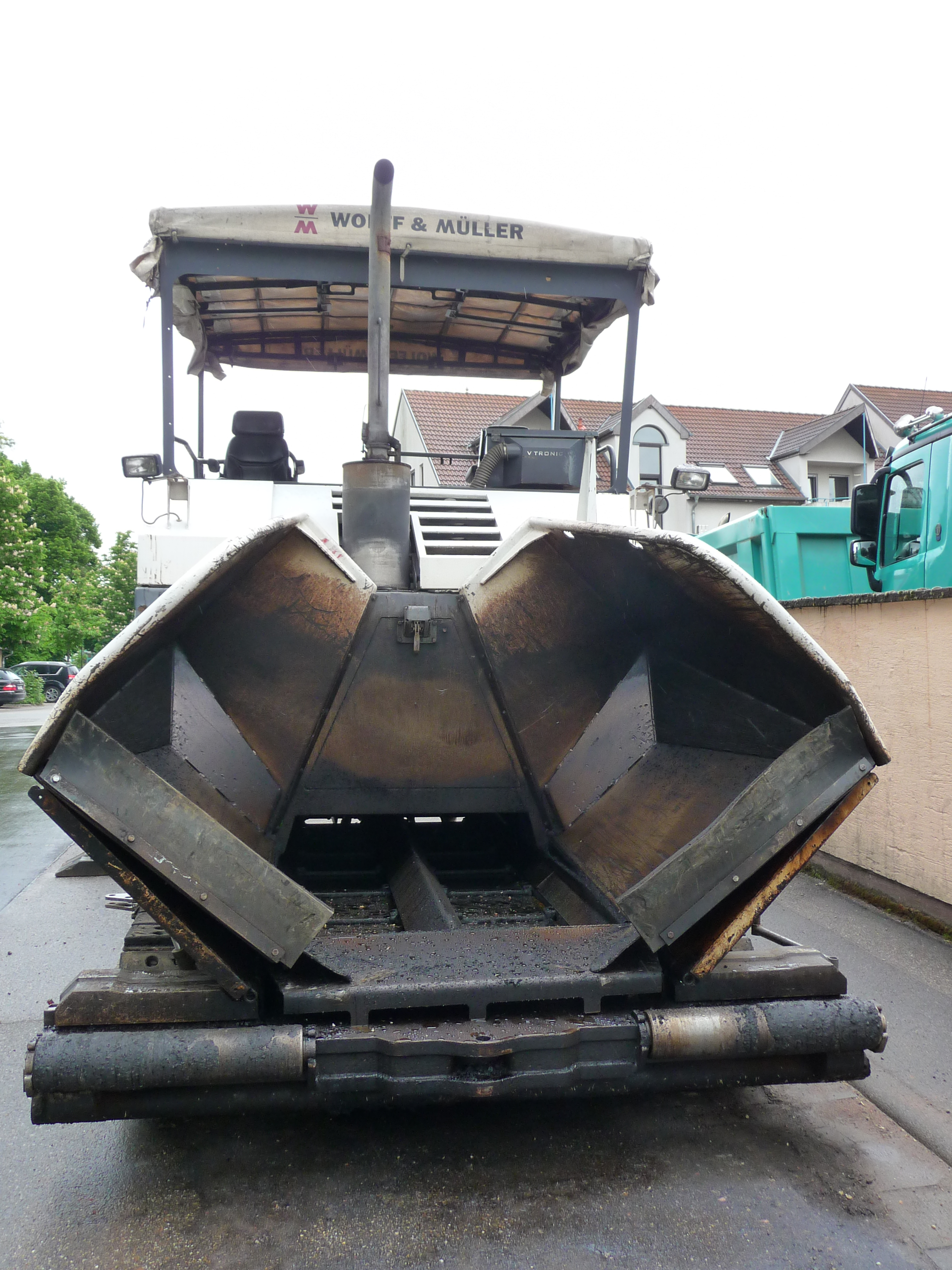 Asphaltfertiger der Firma Wolff & Müller Holding GmbH & Co. KG, eines familiengeführten Baudienstleisters mit Stammsitz in Zuffenhausen, fotografiert in Baden-Württemberg (Deutschland)